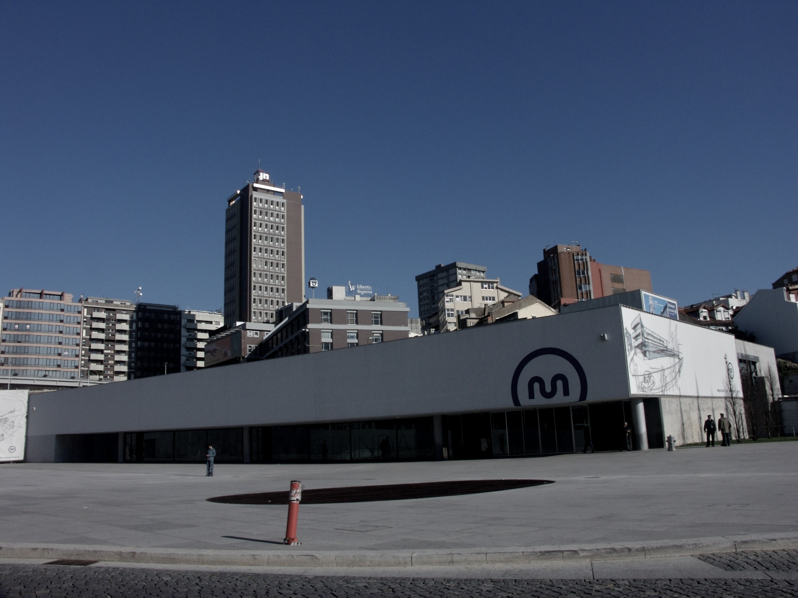 Estação do Metro da Trindade, freguesia de Santo Ildefonso, Porto, Portugal